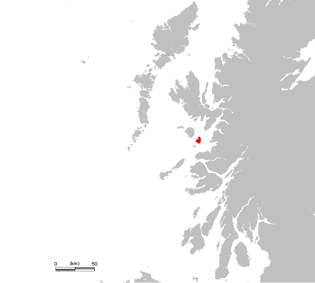 UK Eigg.PNG (Scotland, Hebrides)